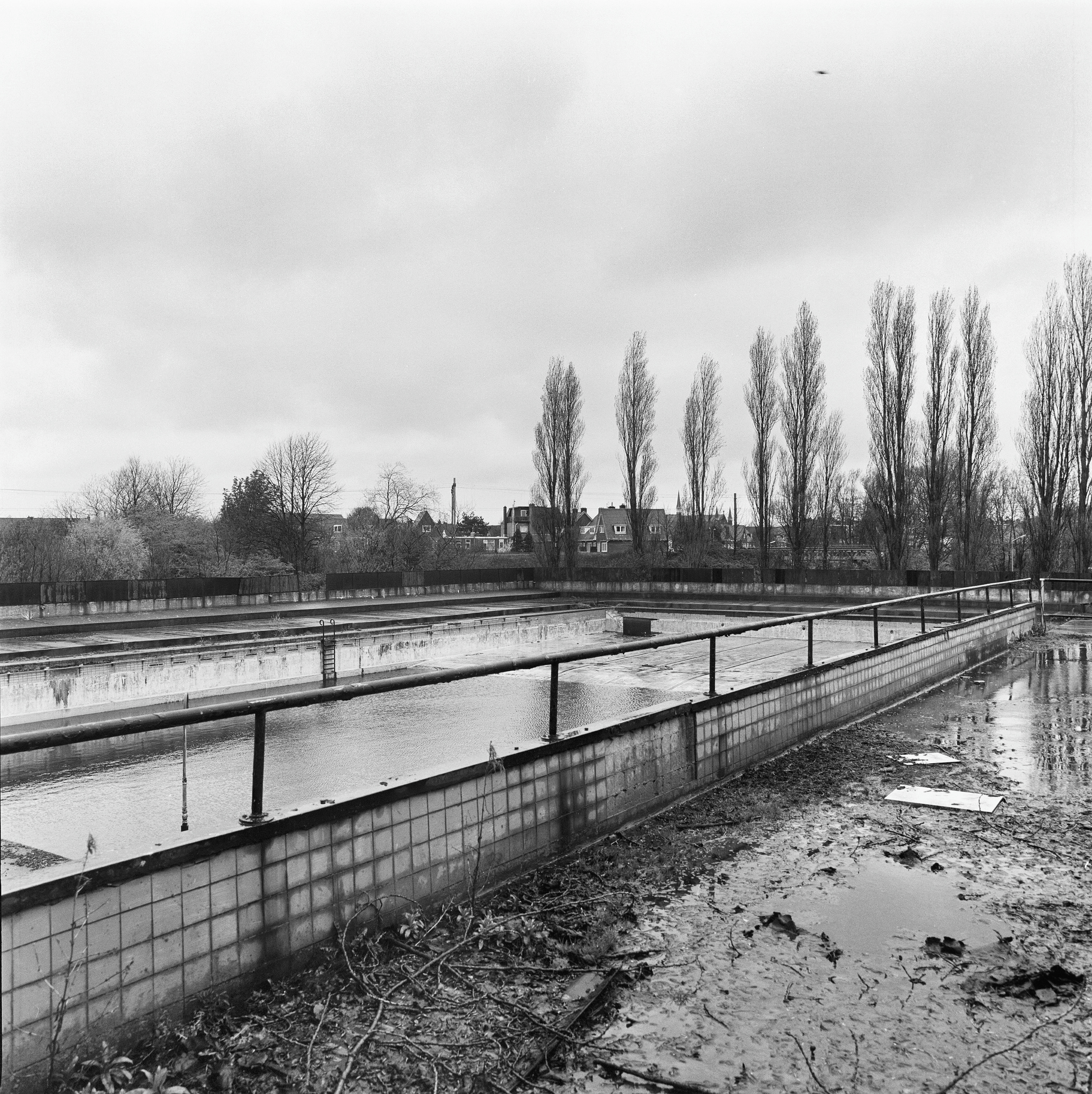 STOOP'S BAD (ED CUYPERS, 1916-1921): Exterieur OVERZICHT, BUITENBAD